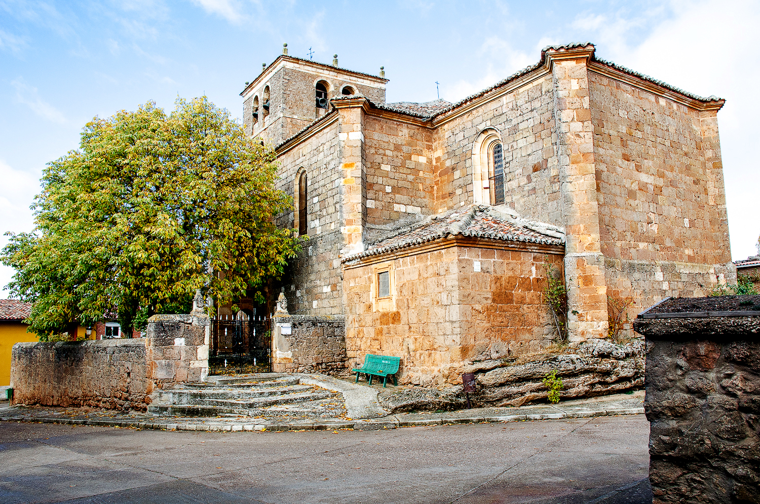 Iglesia de la Asunción de Nuestra Señora de Cañizar de Amaya (Burgos - España)